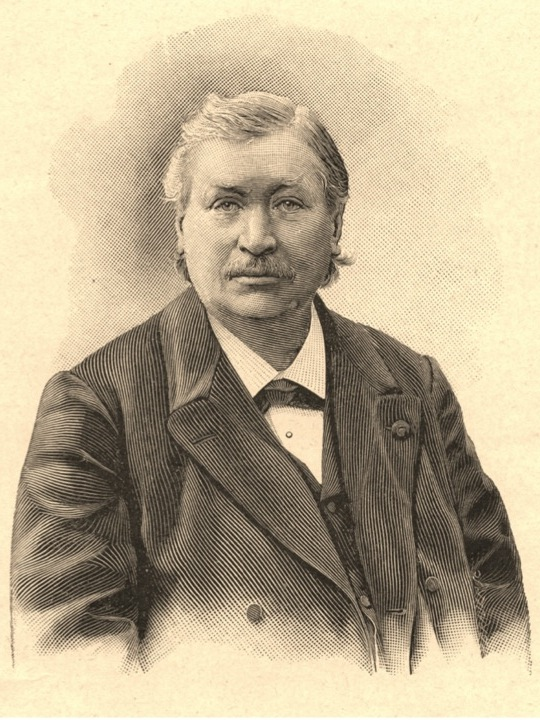 Reproduction du portrait du Dr Nestor Gréhant, publié en 1908 dans "Figures contemporaines tirées de l'album Mariani"